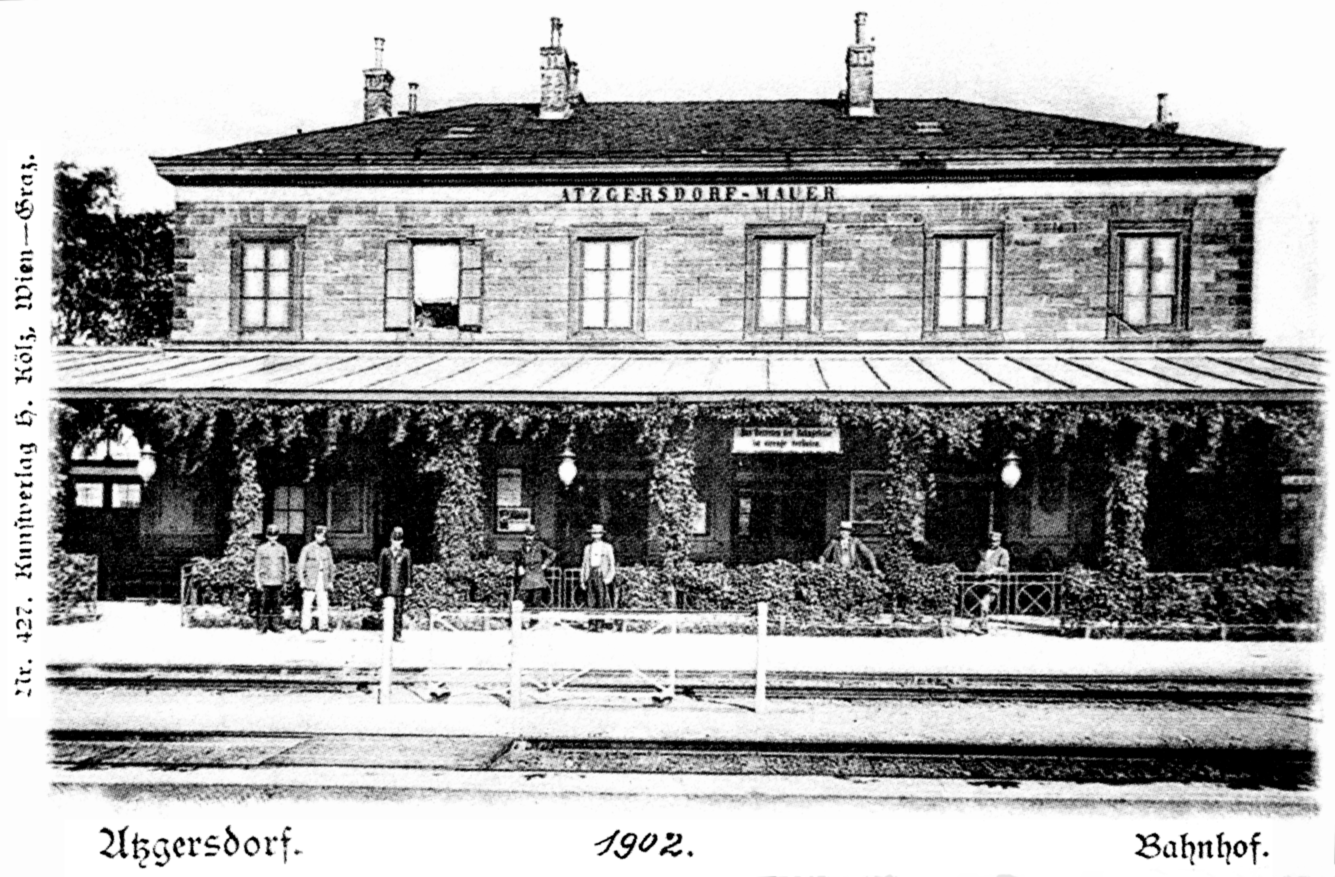 altes Bahnhofsgebäude in Wien-Atzgersdorf um 1902